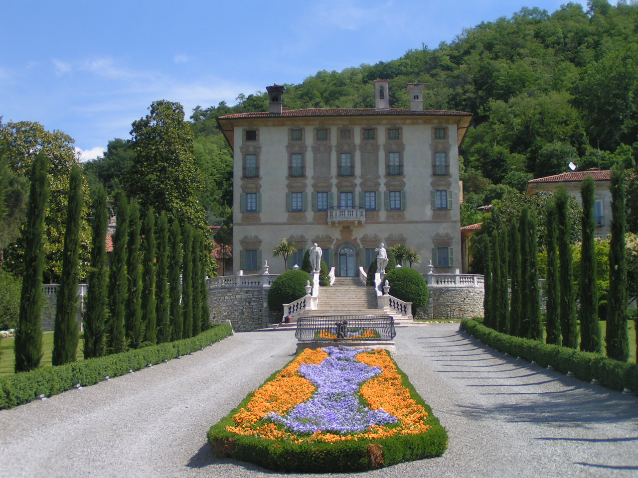 ingresso di Villa Terzi, Trescore Balneario (BG), Italia